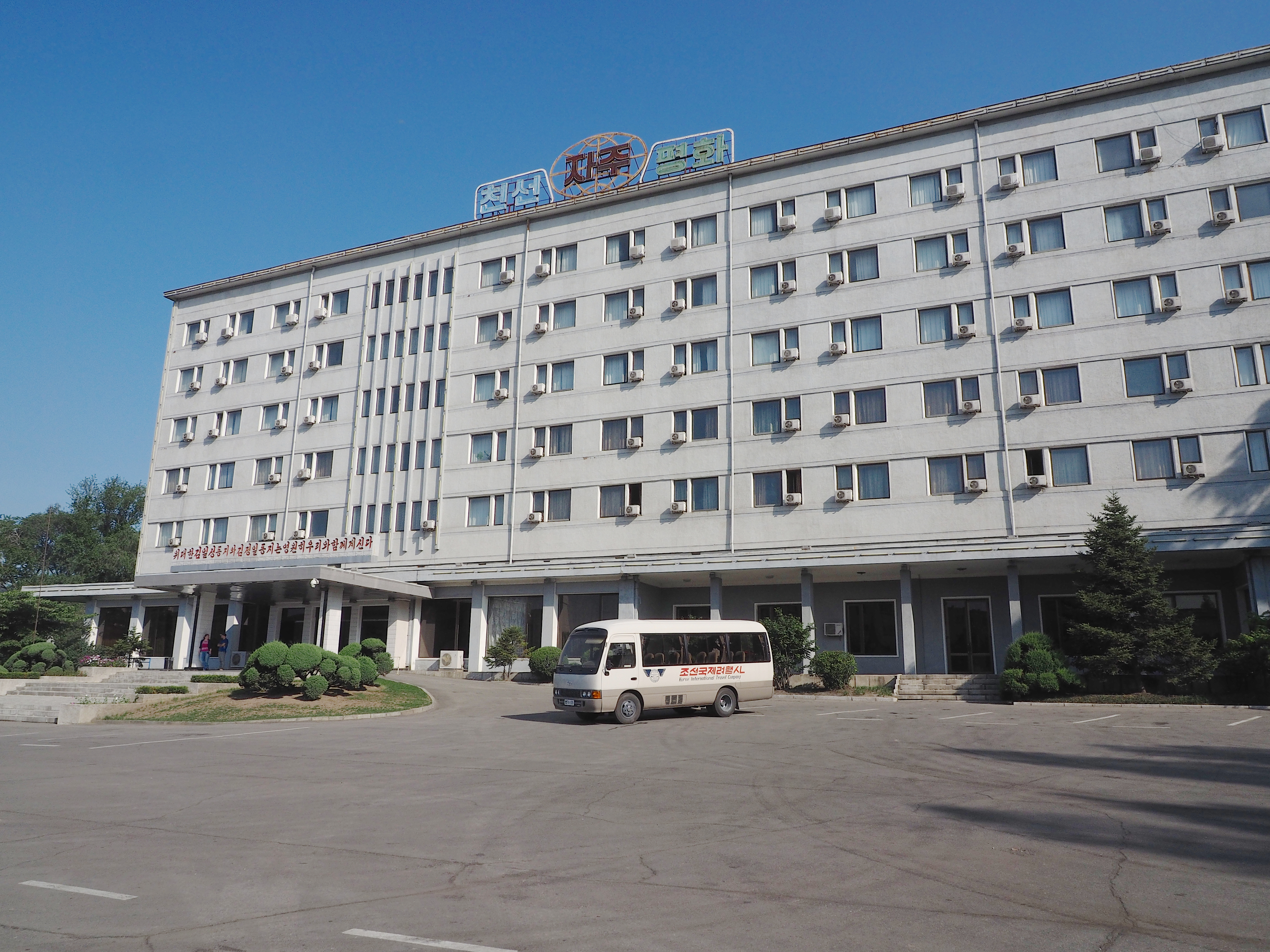 Sin Hung San Hotel Hamhung, DPRK